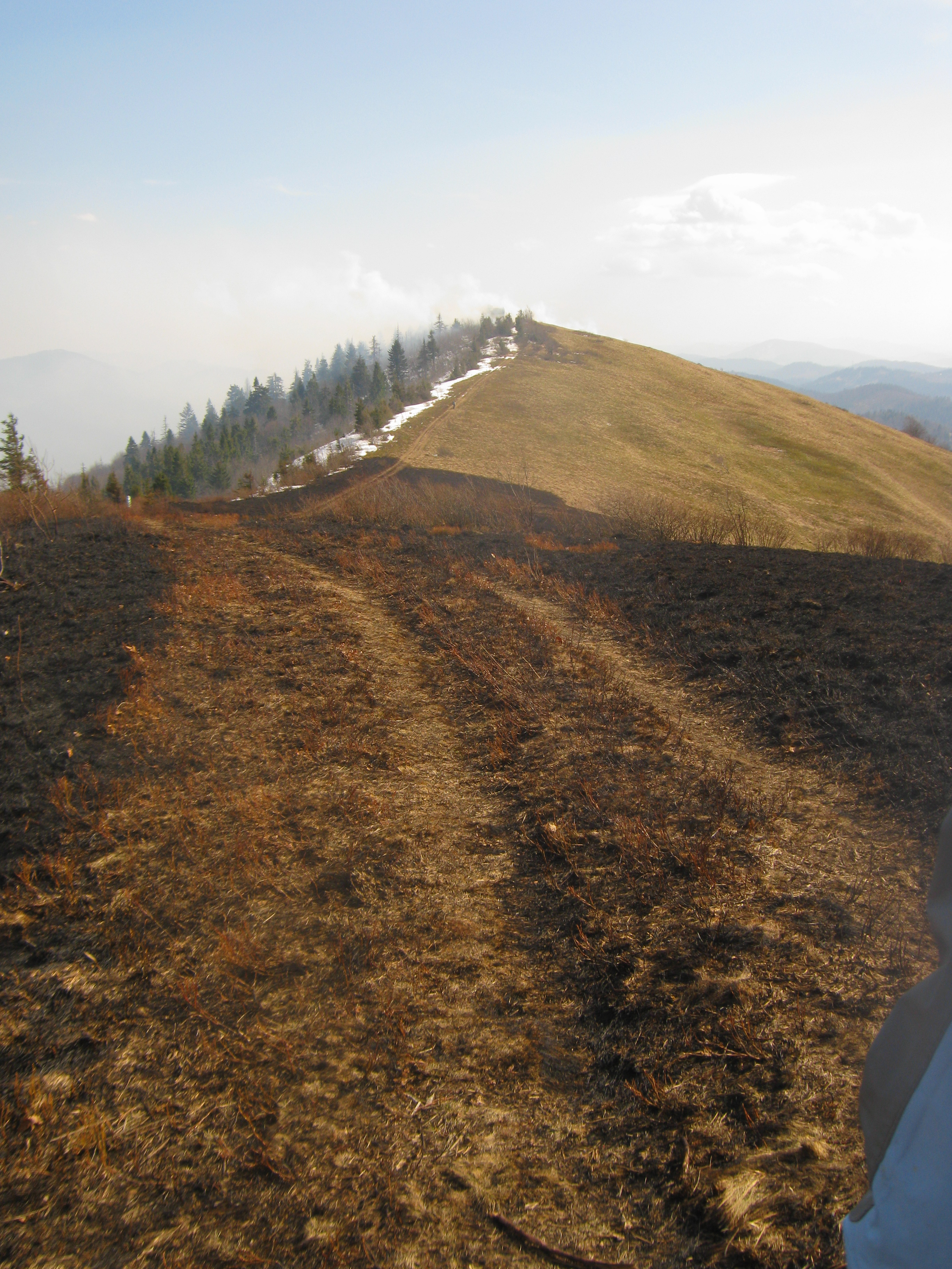 Фото вершини з північного заходу